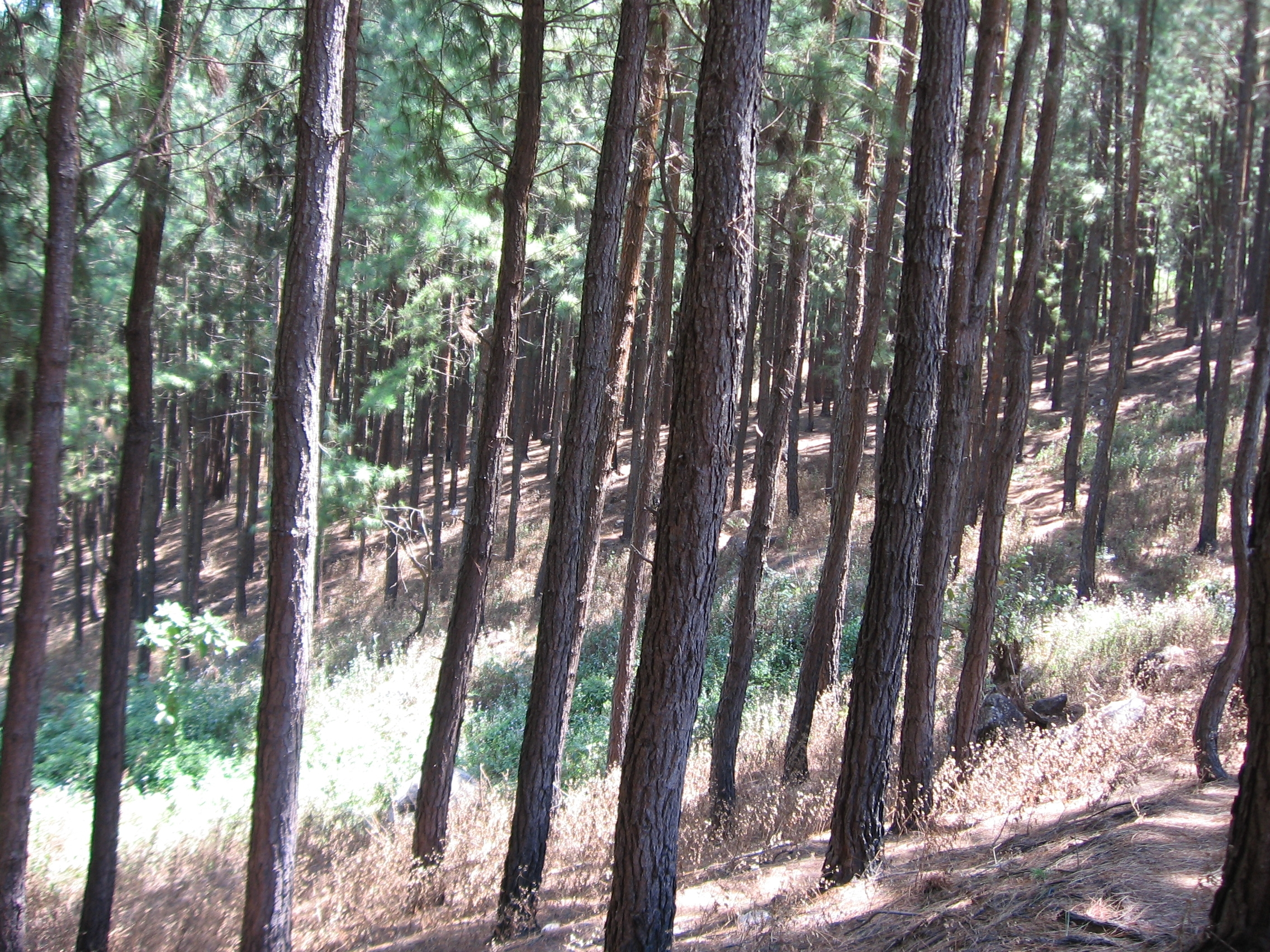 വാഗമണ്ണിലെ പൈൻ‌മരക്കാടുകൾ